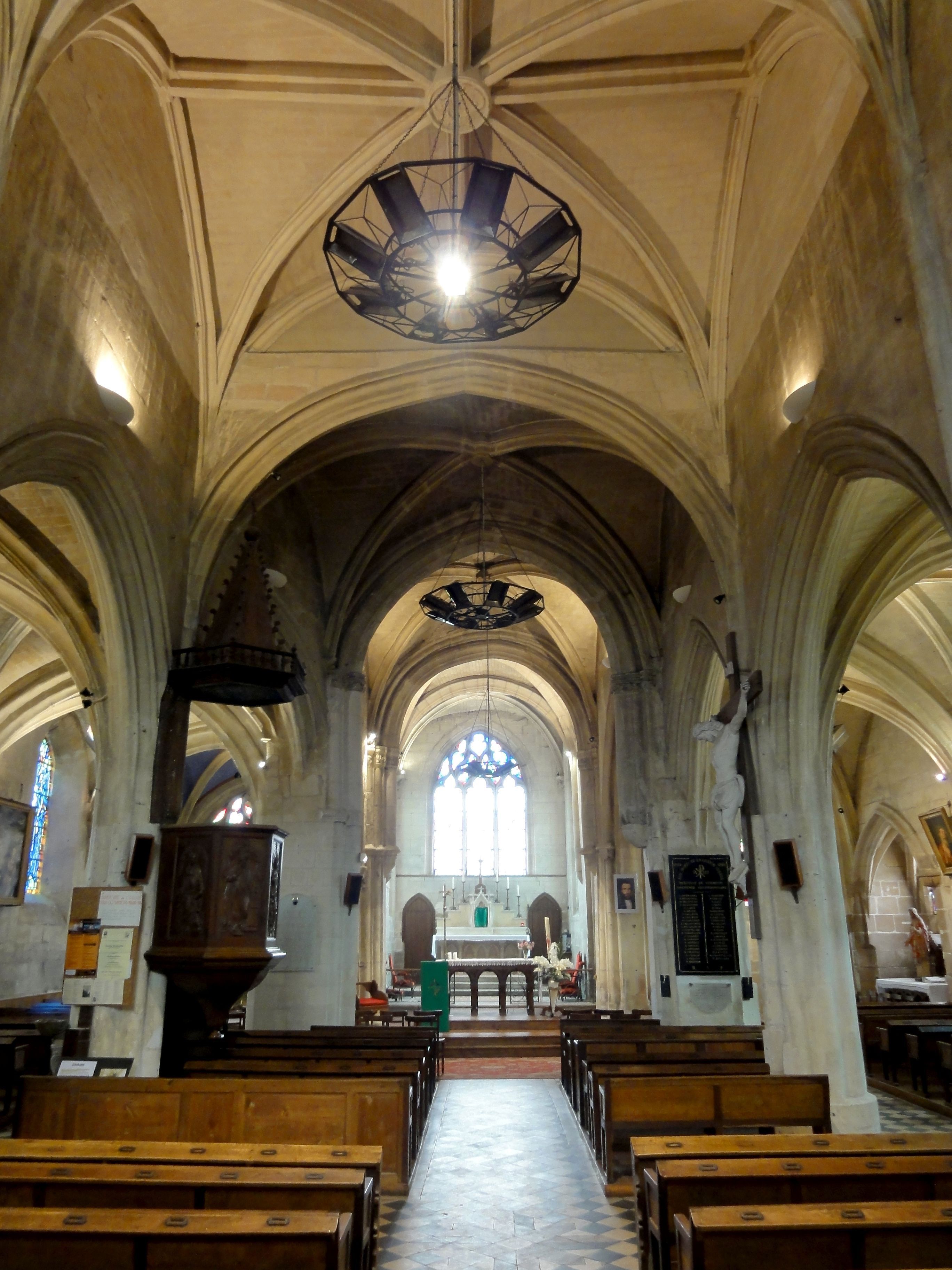 Nef, vue vers l'est.